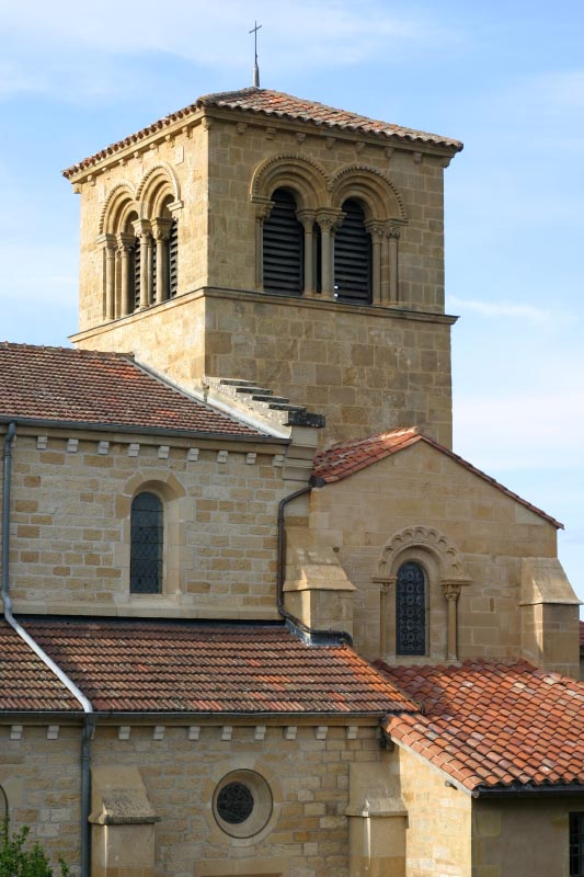 Chevet de l'église de Saint-Bonnet-de-Cray